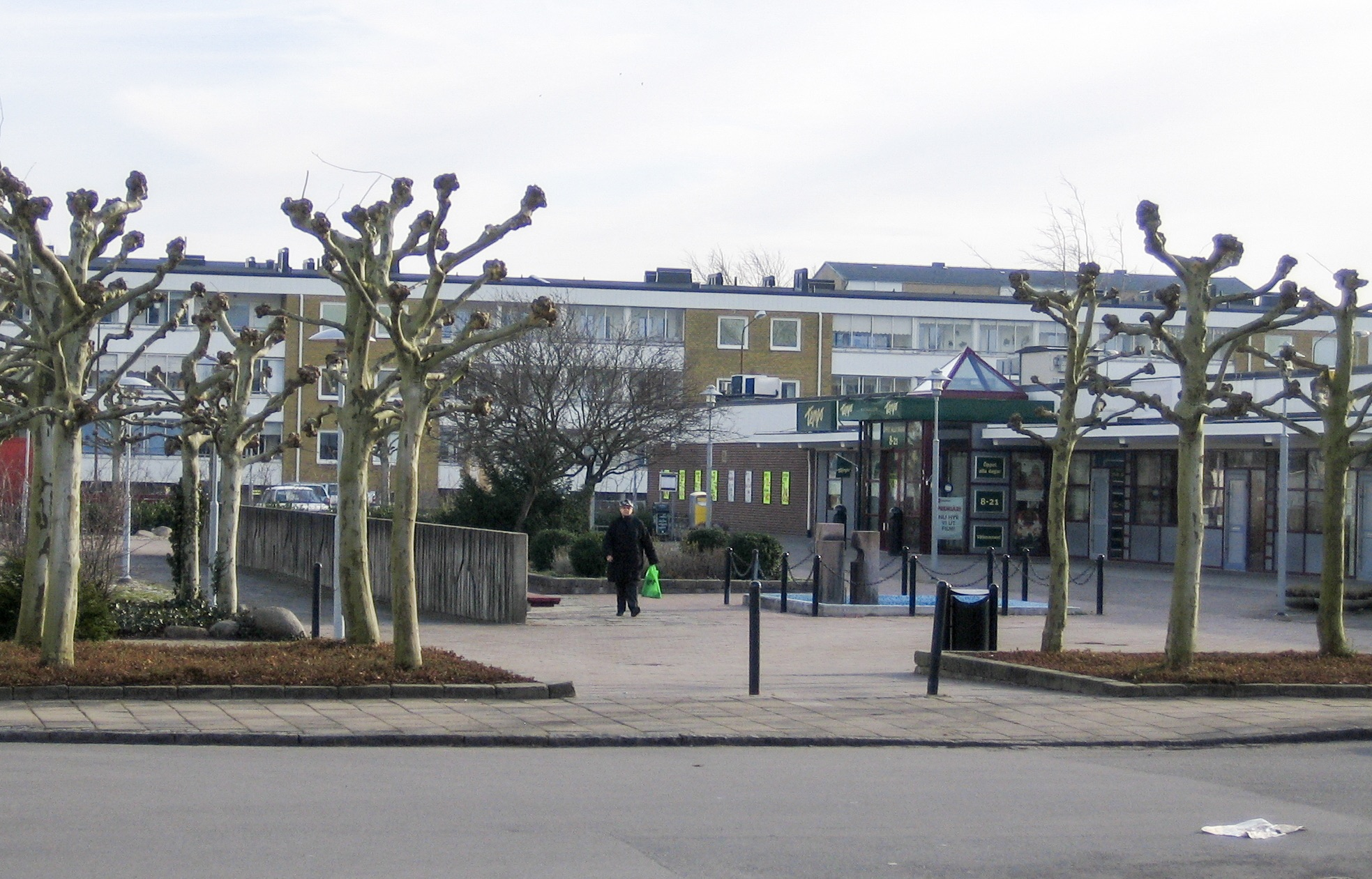 Per Albins hem in Malmö, Sweden.